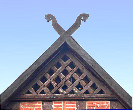 Giebelschmuck an einem Niedersachsenhaus in der Wedemark